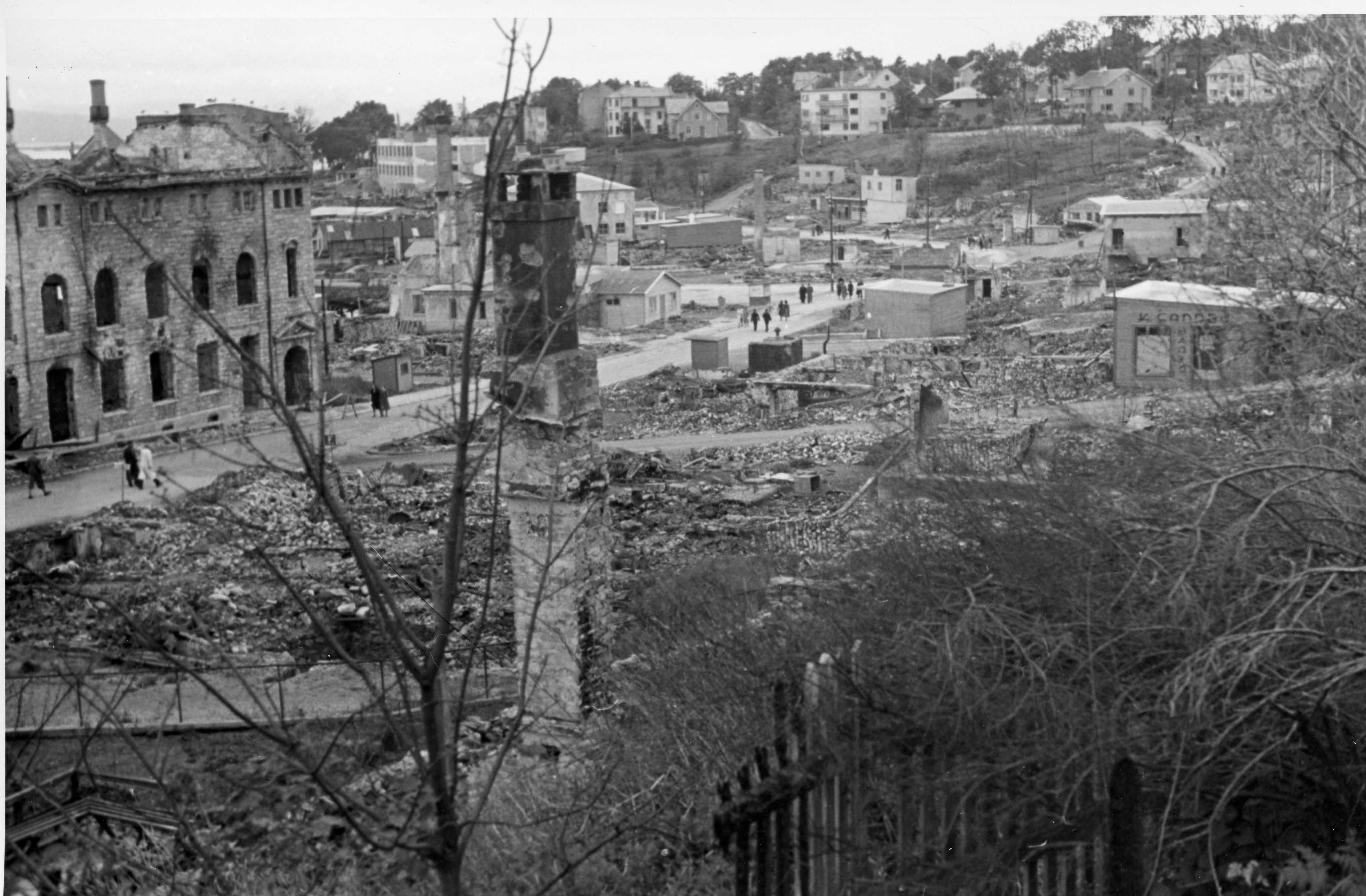 Beskrivelse: Den tyske invasjonen innebar at 24 byer og tettsteder i Norge ble bombet våren 1940. Det gjaldt bl.a. Molde, Kristiansund, Steinkjer og Namsos. Riksarkivet har mottatt 64 fotografier (papirpositiver 9 x 12 cm) som ifølge påskrift på konvolutten skal være tatt i juli 1940 i Kristiansund, Steinkjer og Levanger. Fotografiene har tilhørt ingeniør Hallvard Løken (1908-1995). Han var en dyktig amatørfotograf og kan meget vel ha tatt bildene selv. Takket være god hjelp har vi fått stedsbestemt mange av motivene, men ikke alle, og Riksarkivet mottar gjerne nærmere opplysninger. Arkivreferanse: PA-1667U2_038 The bombing of Molde The German invasion resulted in 24 towns and villages being bombed in the spring of 1940. This included Molde, Kristiansund, Steinkjer and Namsos. The National Archives of Norway has received 64 photographs (paper positives 9 x 12 cm) that according to information on the envelope are taken in July 1940 in Kristiansund, Steinkjer and Levanger. The photos have belonged to engineer Hallvard Løken (1908-1995). He was a good amateur photographer and might very well have taken the photos himself. Thanks to help from others, we have been able to pinpoint many of the locations and their locations, but not all of them, and the National Archives of Norway is very happy to receive further information.